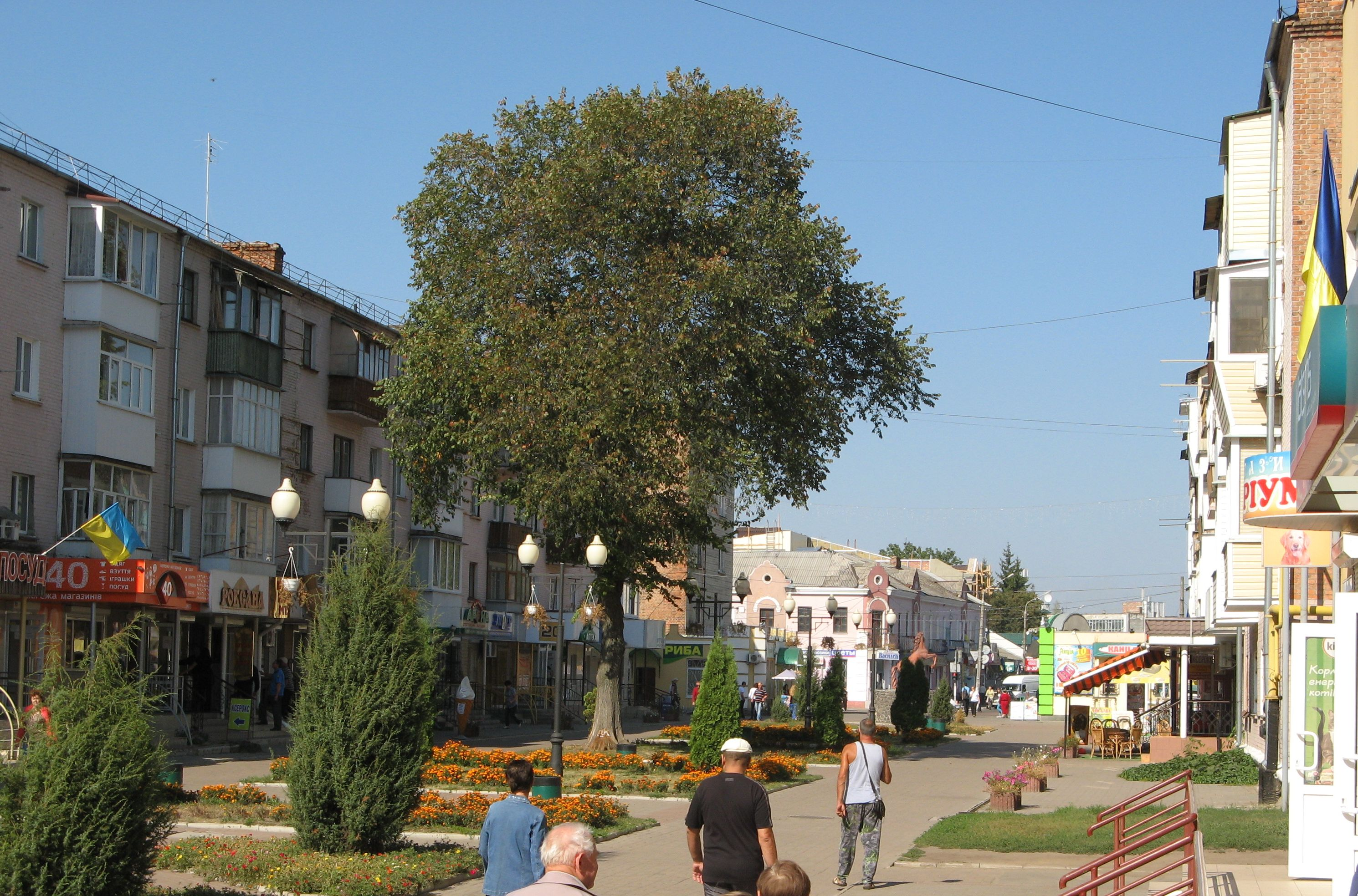 Пішохідна зона у центрі Конотопа